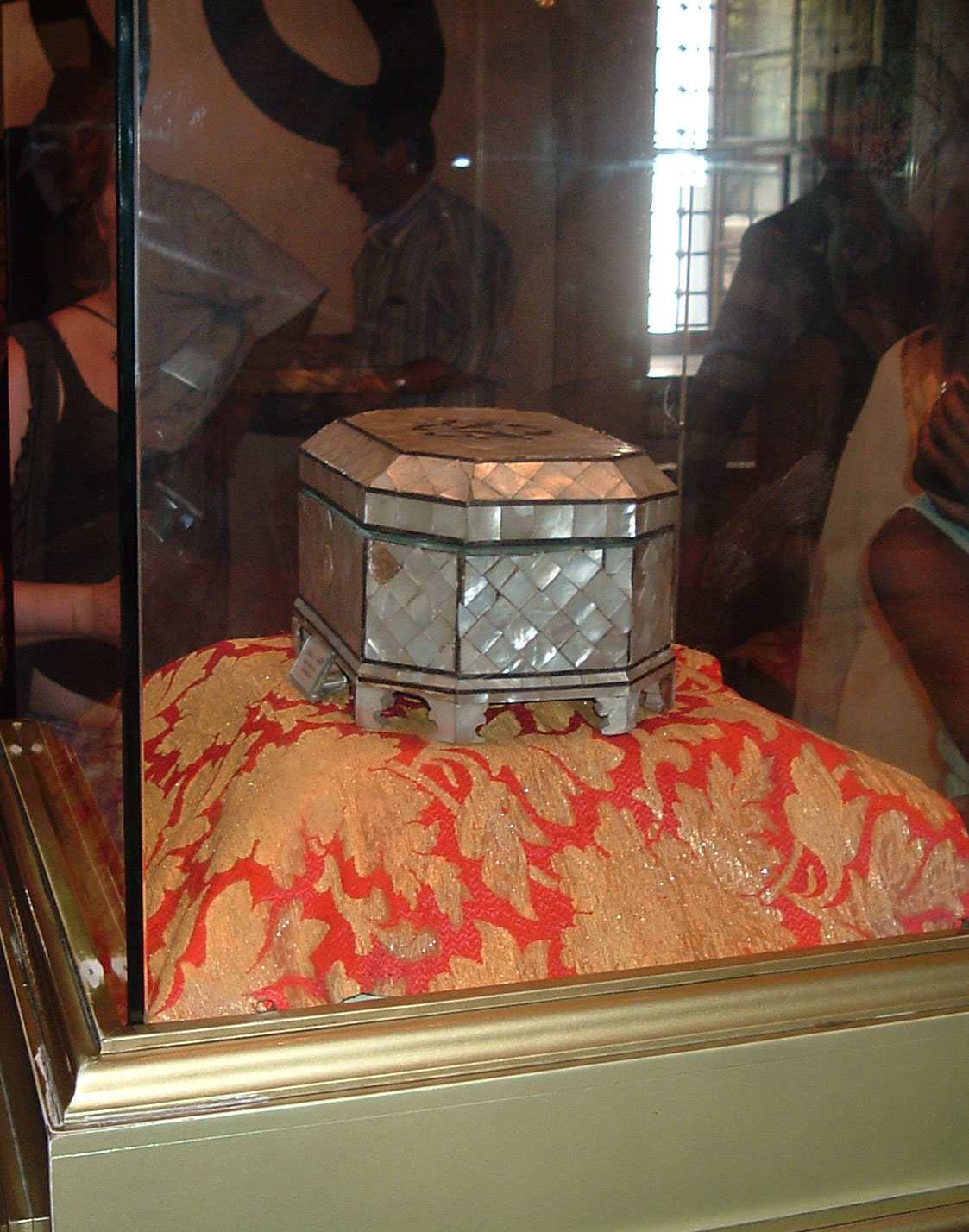 Relique du prophete Mohammed à Konya